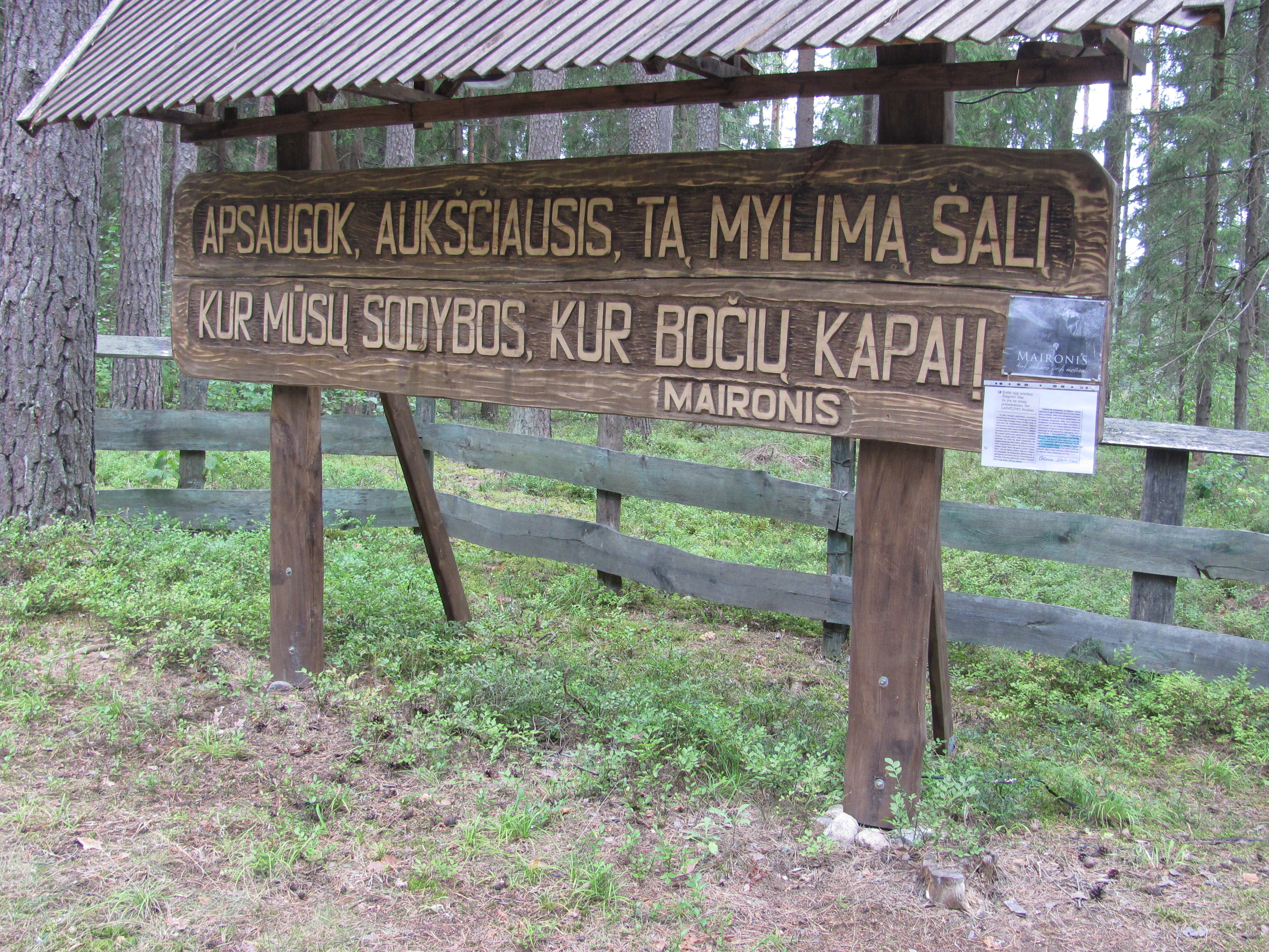 Kazitiškio sen., Lithuania